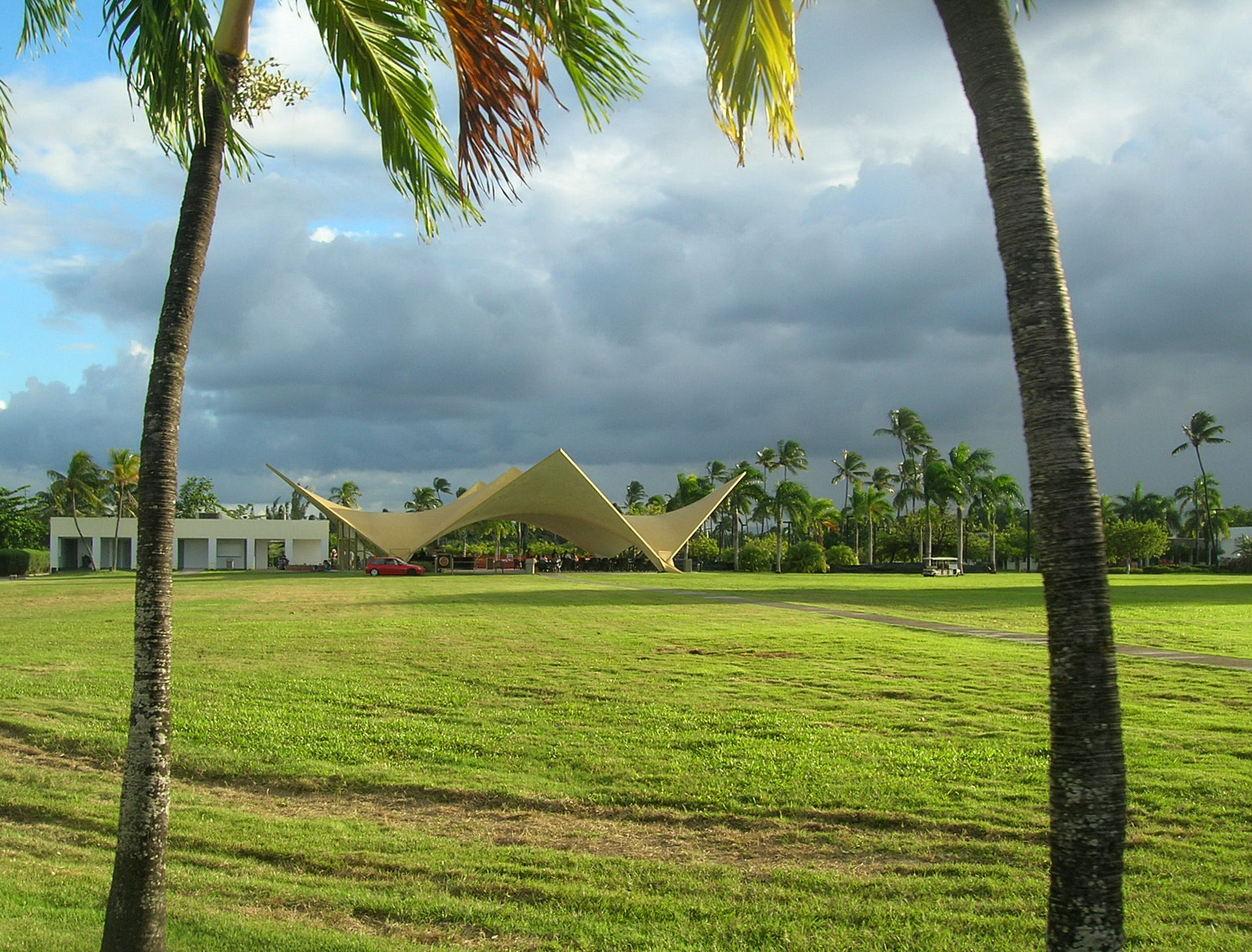 Bacardi Pavillion